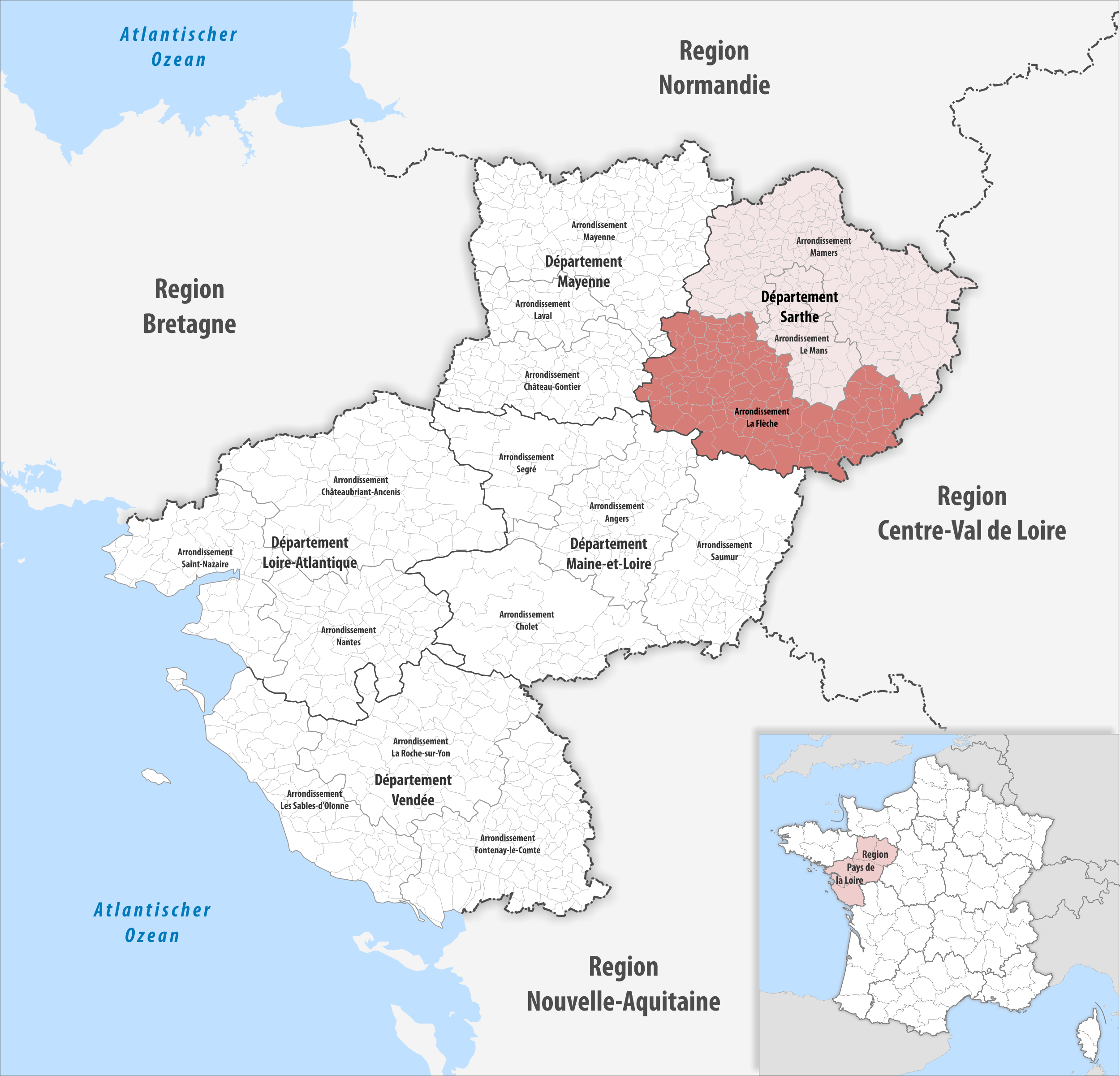 Lage des Arrondissements La Flèche